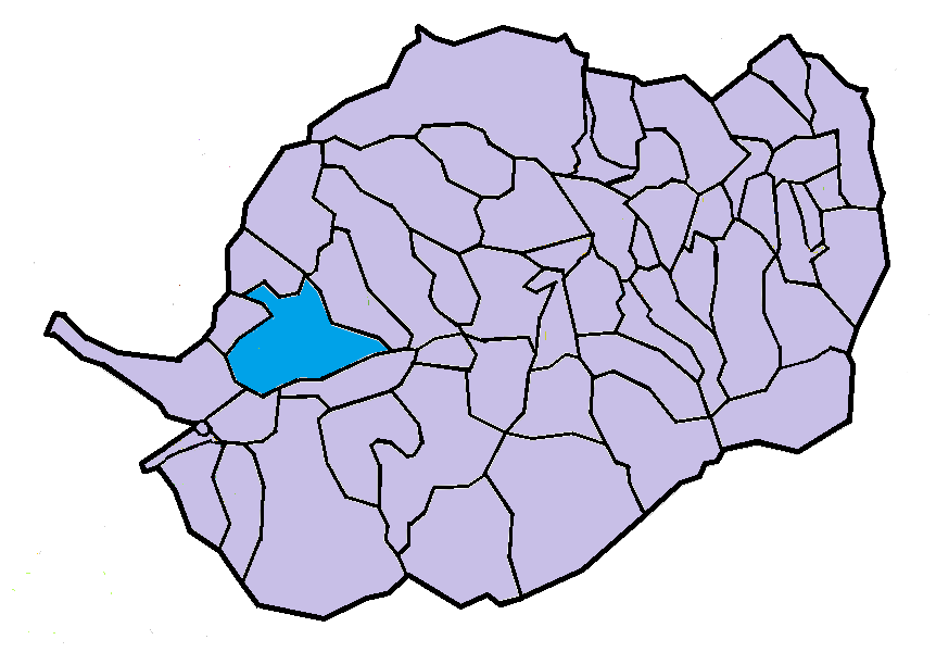 Aiguatèbia i Talau en el Conflent, a partir del mapa municipal del Conflent de lliure disposició adaptat al Nomenclàtor toponímic aprovat el 2007